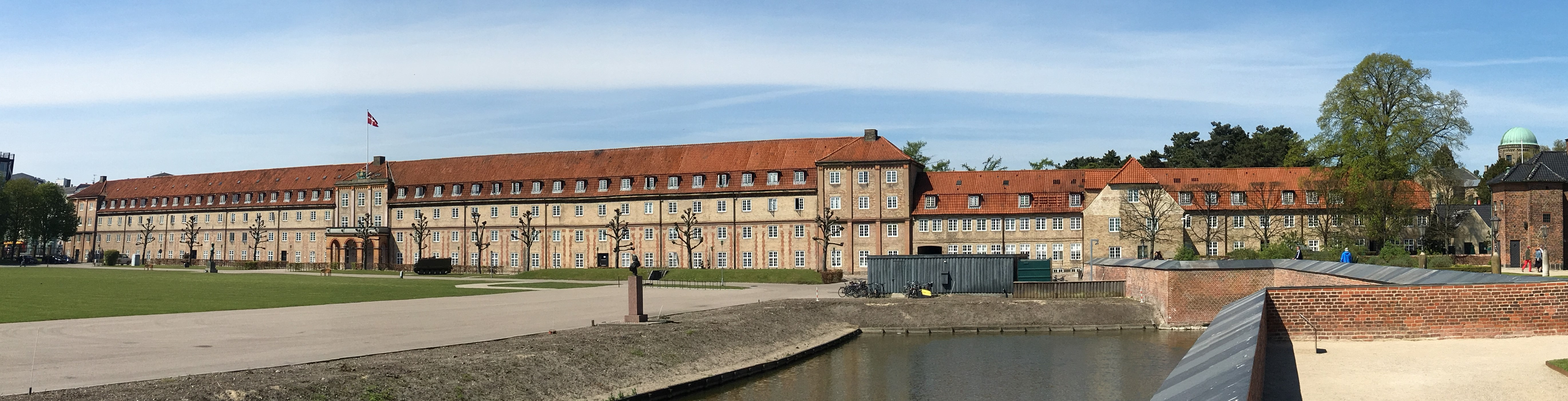 Rosenborg Barracks in Copenhagen, Denmark